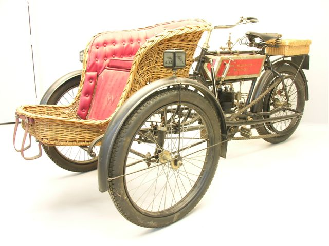 Waddington Fafnir 500 cc forecar from 1905.